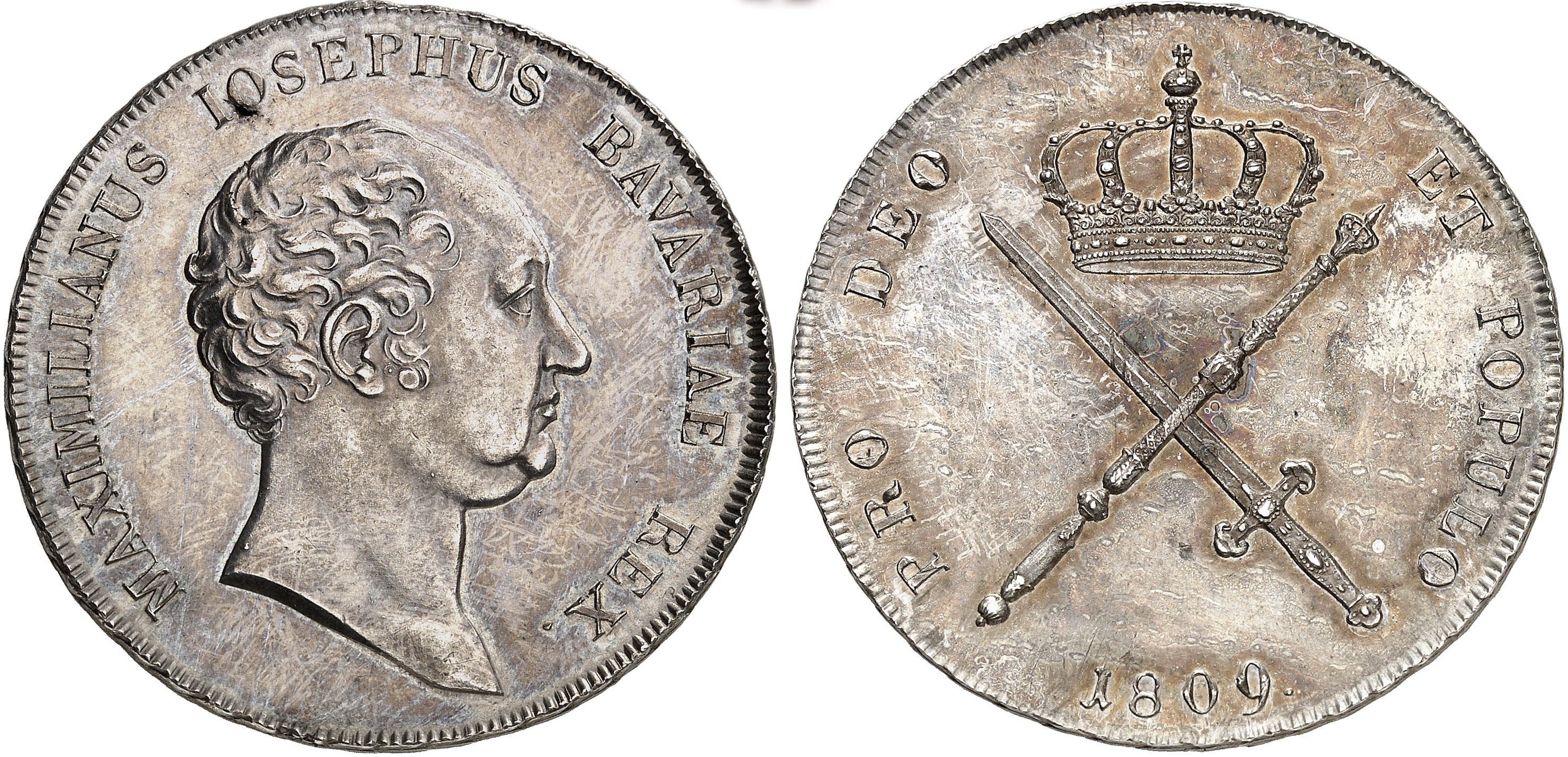 Maximilian I. Joseph von Bayern: Kronentaler 1809, Probe mit Laubrand. AKS 44 Anm., Dav. 552 var., Kahnt 64 a, Thun 44 Anm. Fritz Rudolf Künker GmbH & Co. KG, Auction 335.